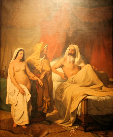 Présentation d'Agar à Abraham